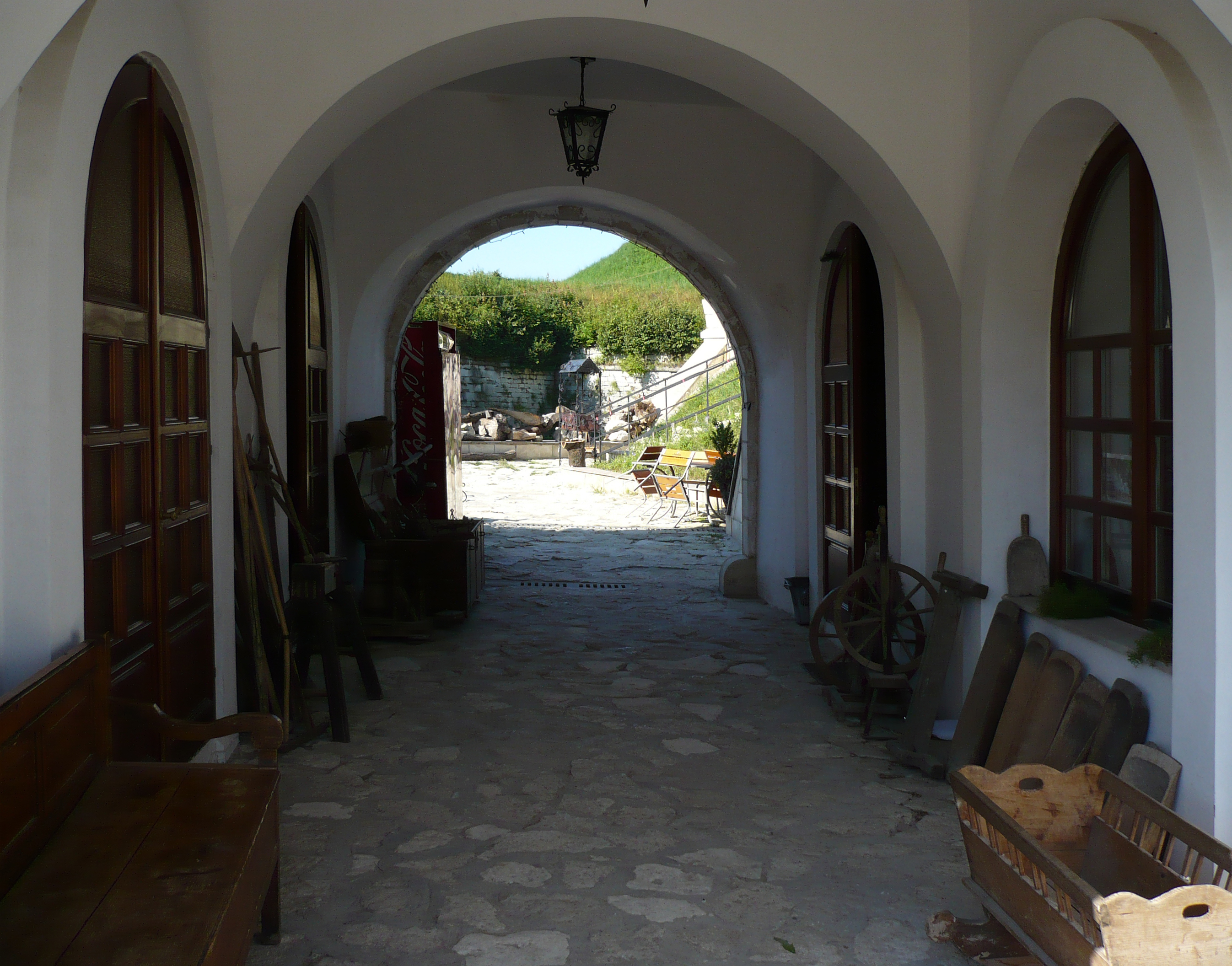 Wjazd do zamku w Złoczowie